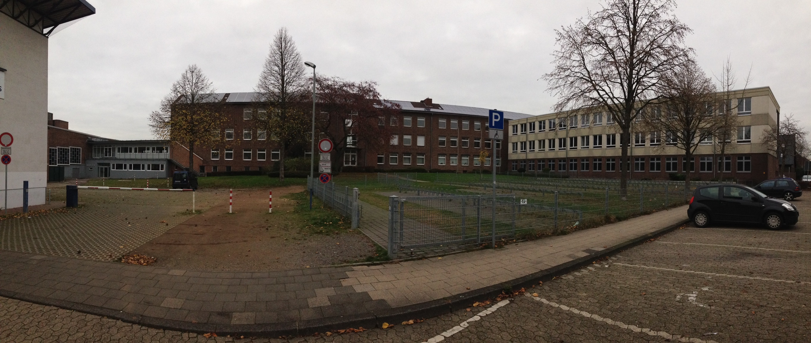 Andreas-Vesalius-Gymnasium in Wesel